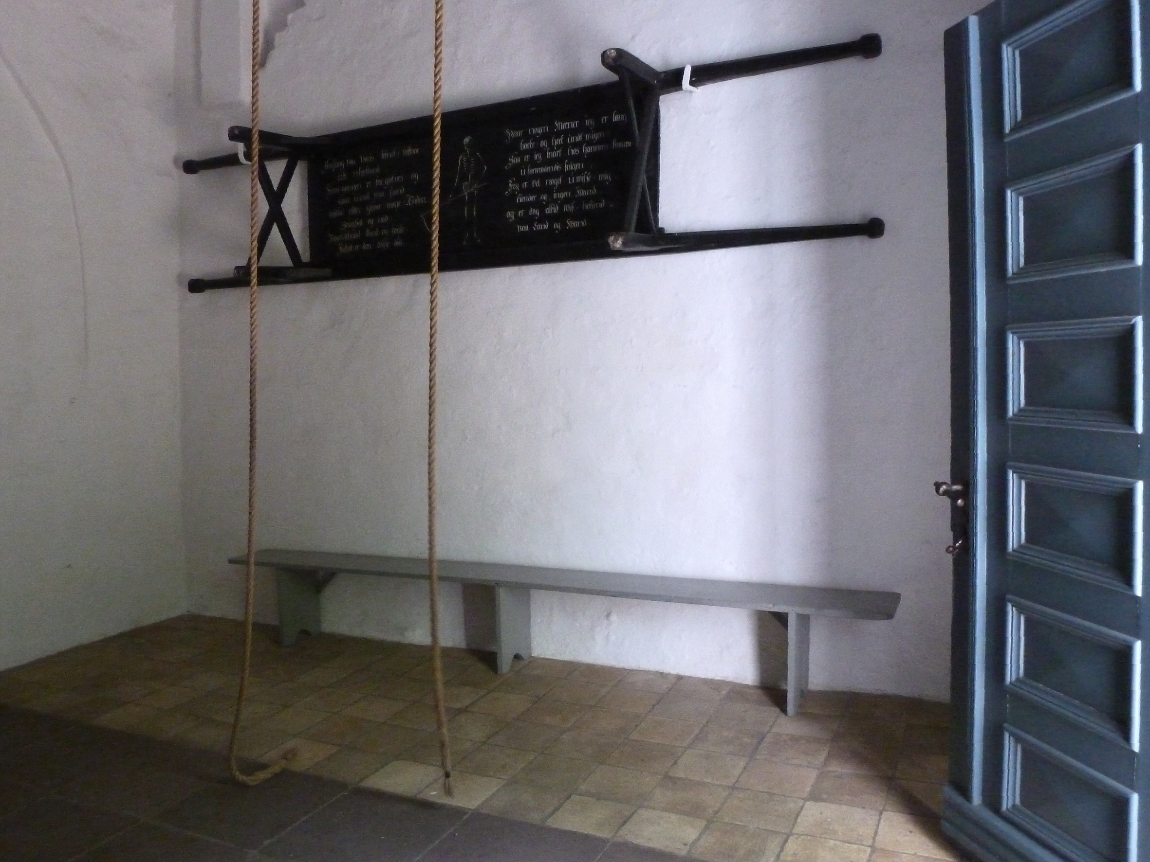 Totenbahre (catafalque) im Vorraum der Daler Kirke, Daler Sogn, Jütland, Dänemark.